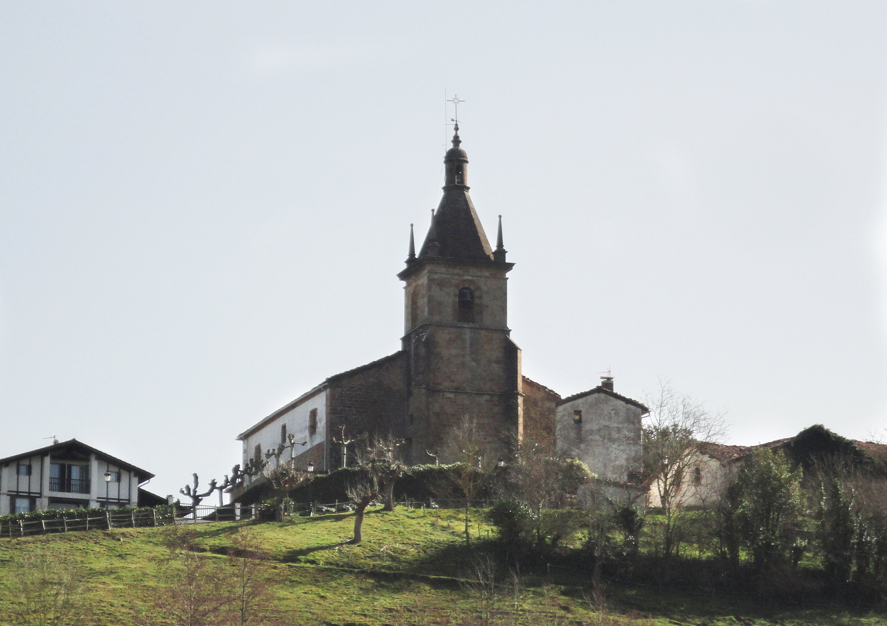 Ama Jasokundearen eliza - Zerain